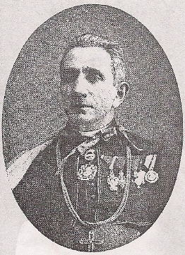 Костел_Воздвиження_Святого_Хреста_(Чернівці))-8.jpg: найвідоміший чернівецький римо-католицький священики Йозеф Шмід